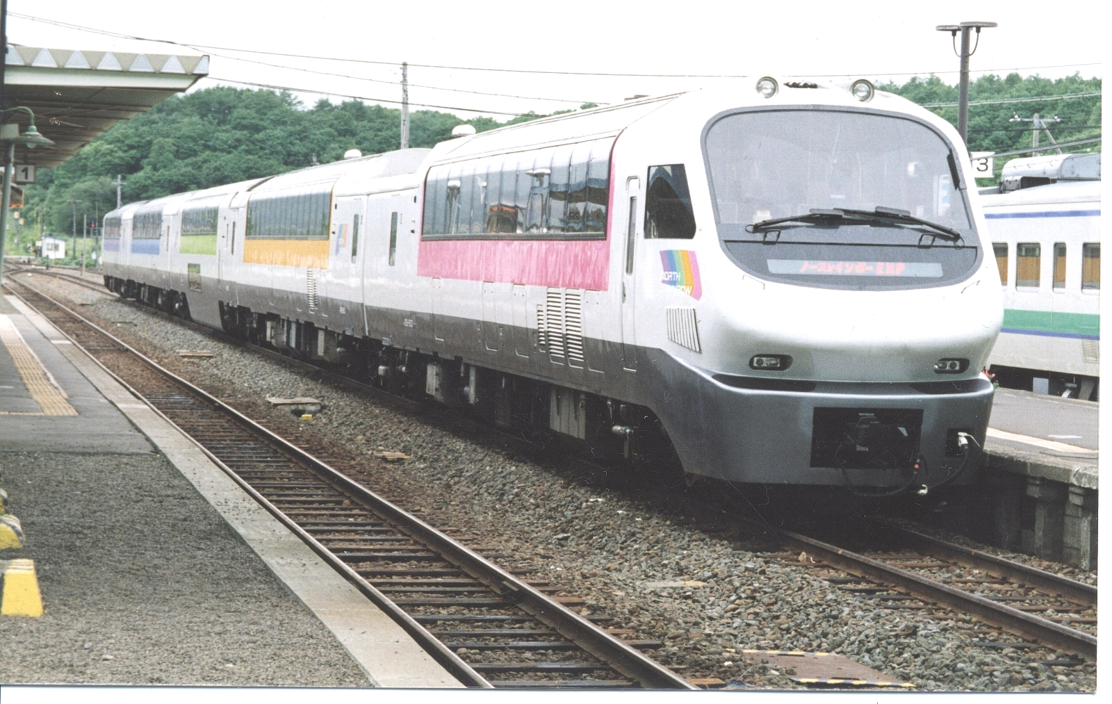 釧網本線摩周駅に停車中のノースレインボーエクスプレス